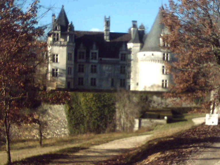 Château de Puyguilhem nahe Villars (Périgord vert), selbst aufgenommen am 03.01.2005 mit einem S 65-Fotohandy von Benutzer:Bordeaux.